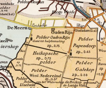 Polder Oudenrijn